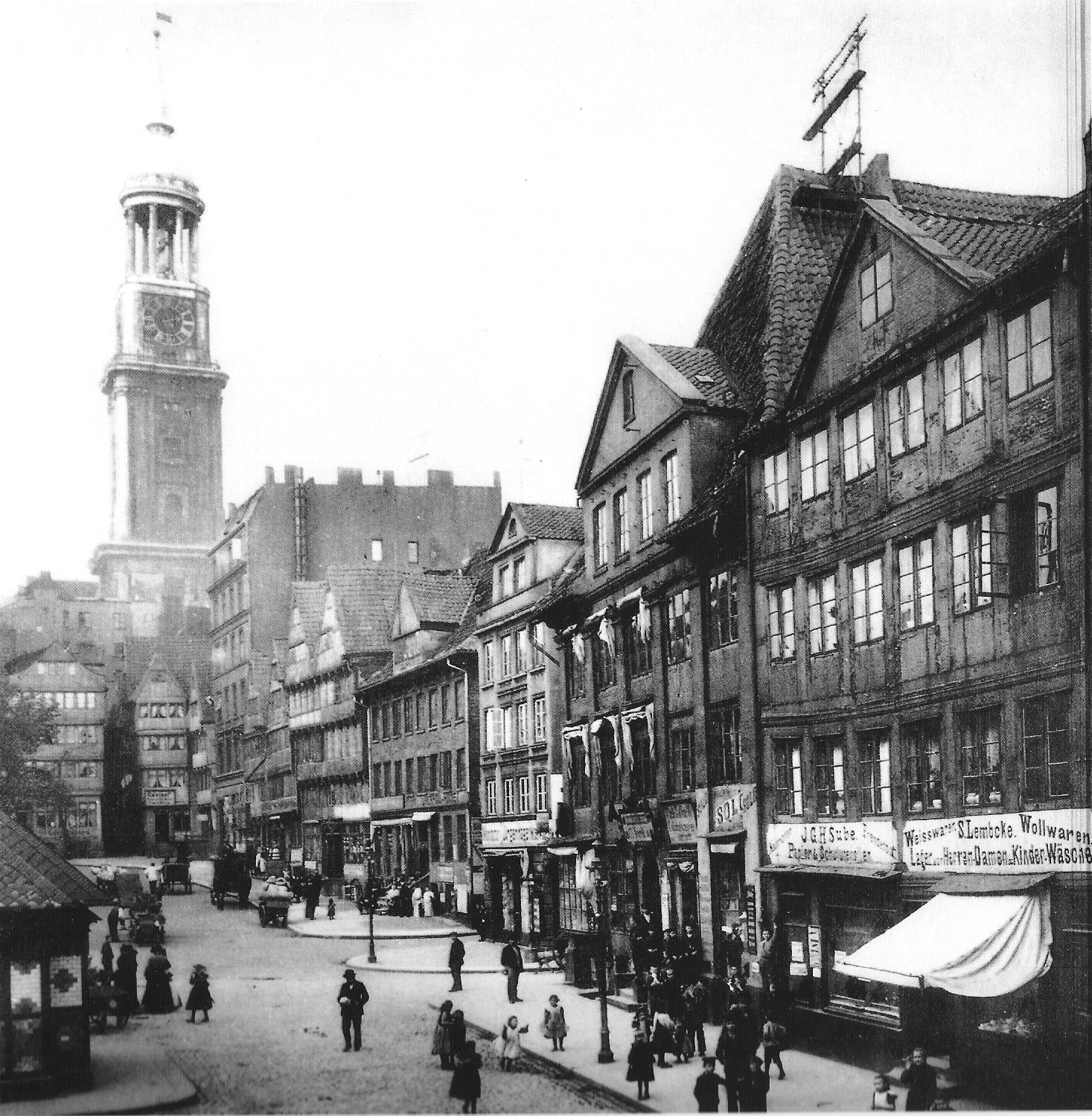 Der Schaarmarkt in der Hamburger Neustadt 1889, im Hintergrund St. Michaelis.